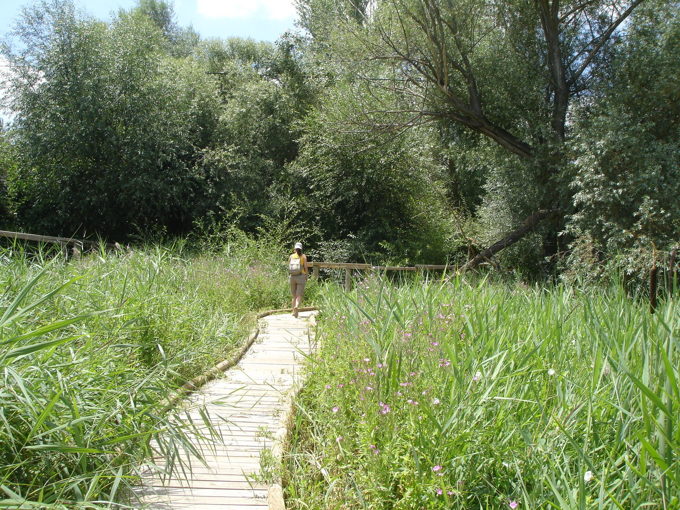 Reserva Natural de las Riberas de Castronuño-Vega del Duero